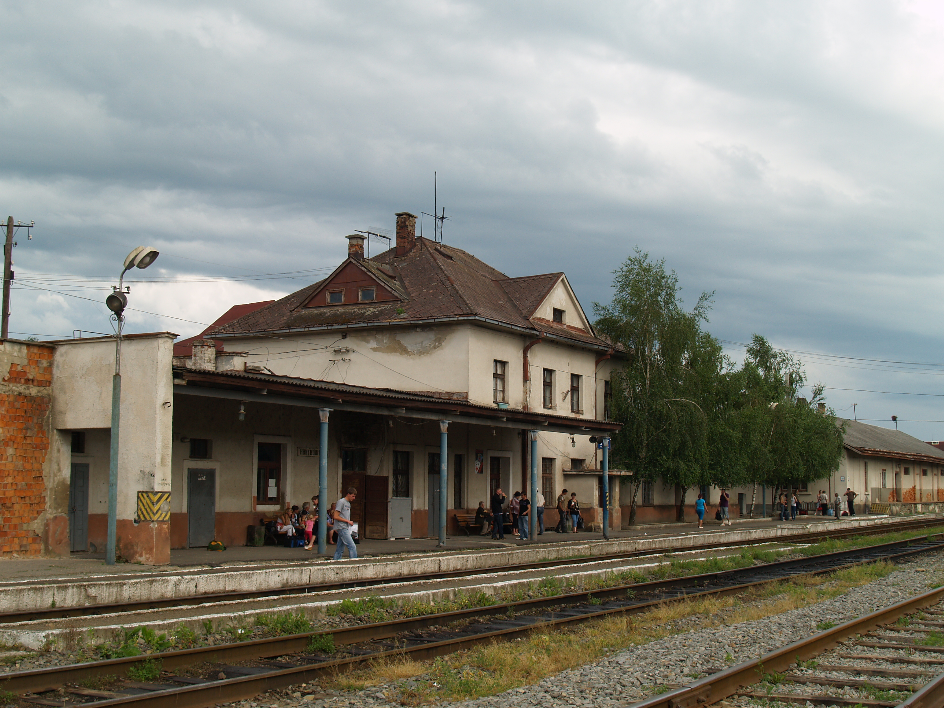 Вокзал ст. Хуст, Львівська залізниця